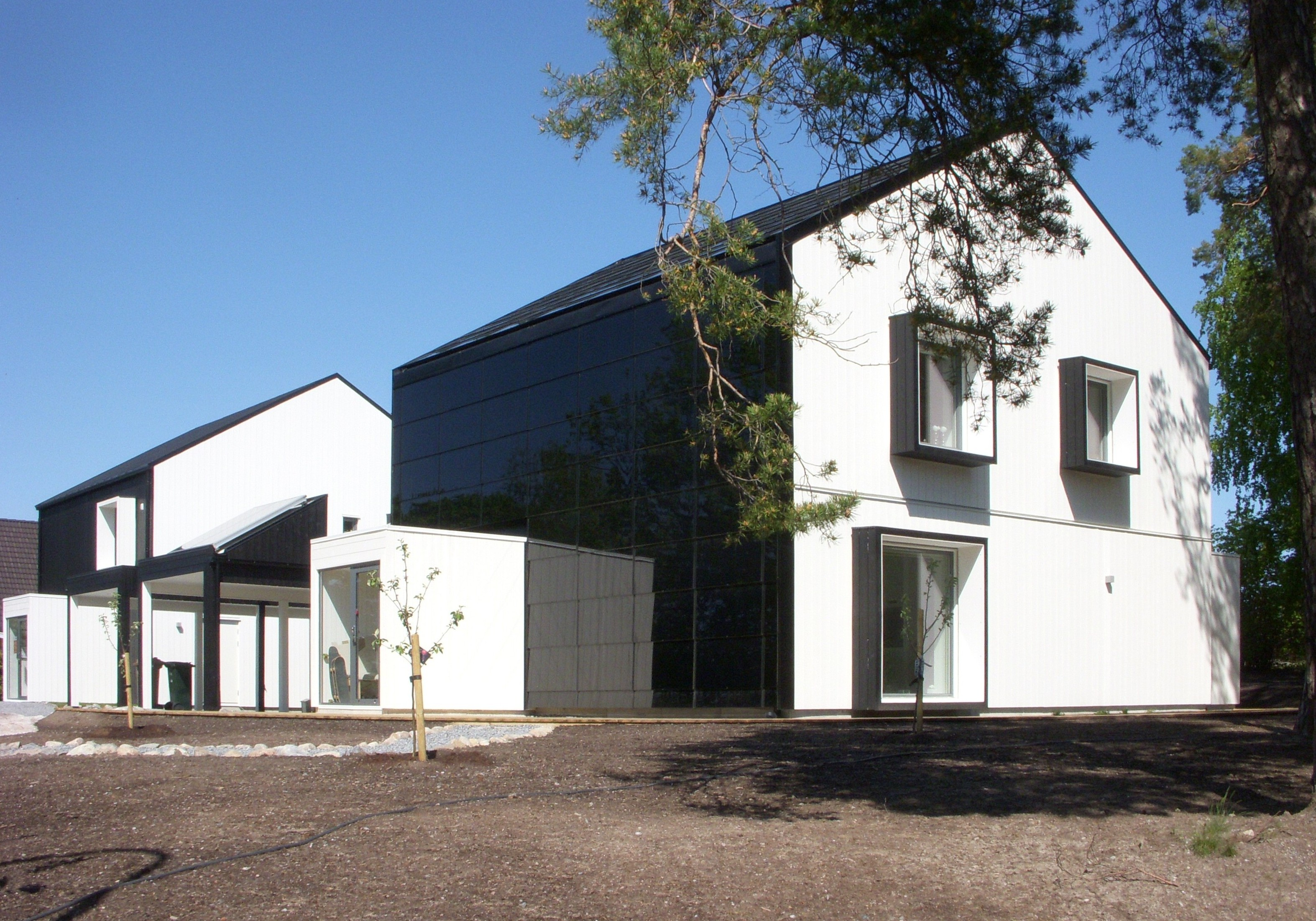 One Tonne Life är ett experimentellt, klimatsmart enbostadshus vid Älghagsstigen 24 i Hässelby villastad, nordvästra Stockholm.